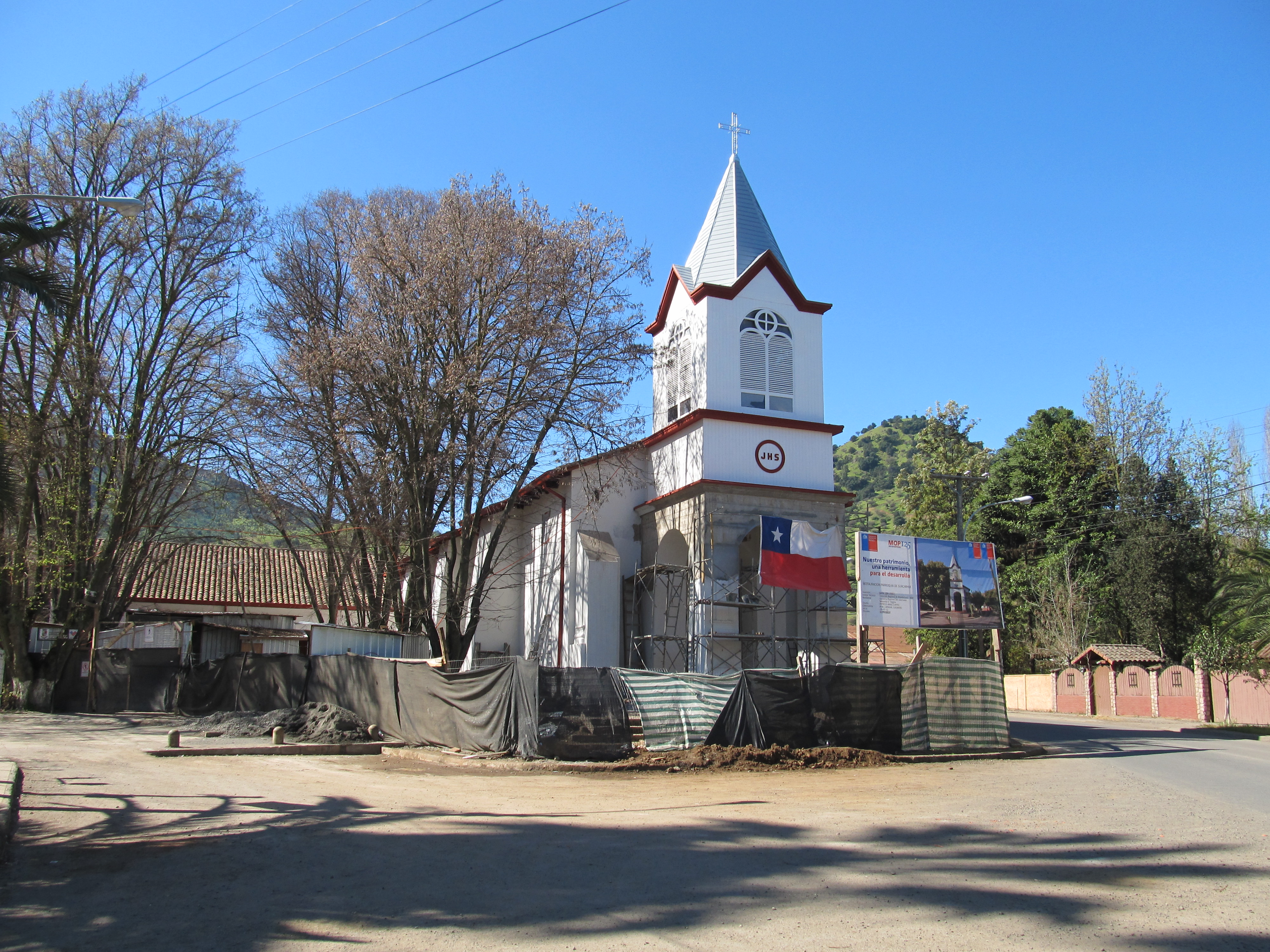 Iglesia de Guacarhue This is a photo of a national monument in Chile: 374